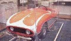 Original Autopia Car under Plexiglas.